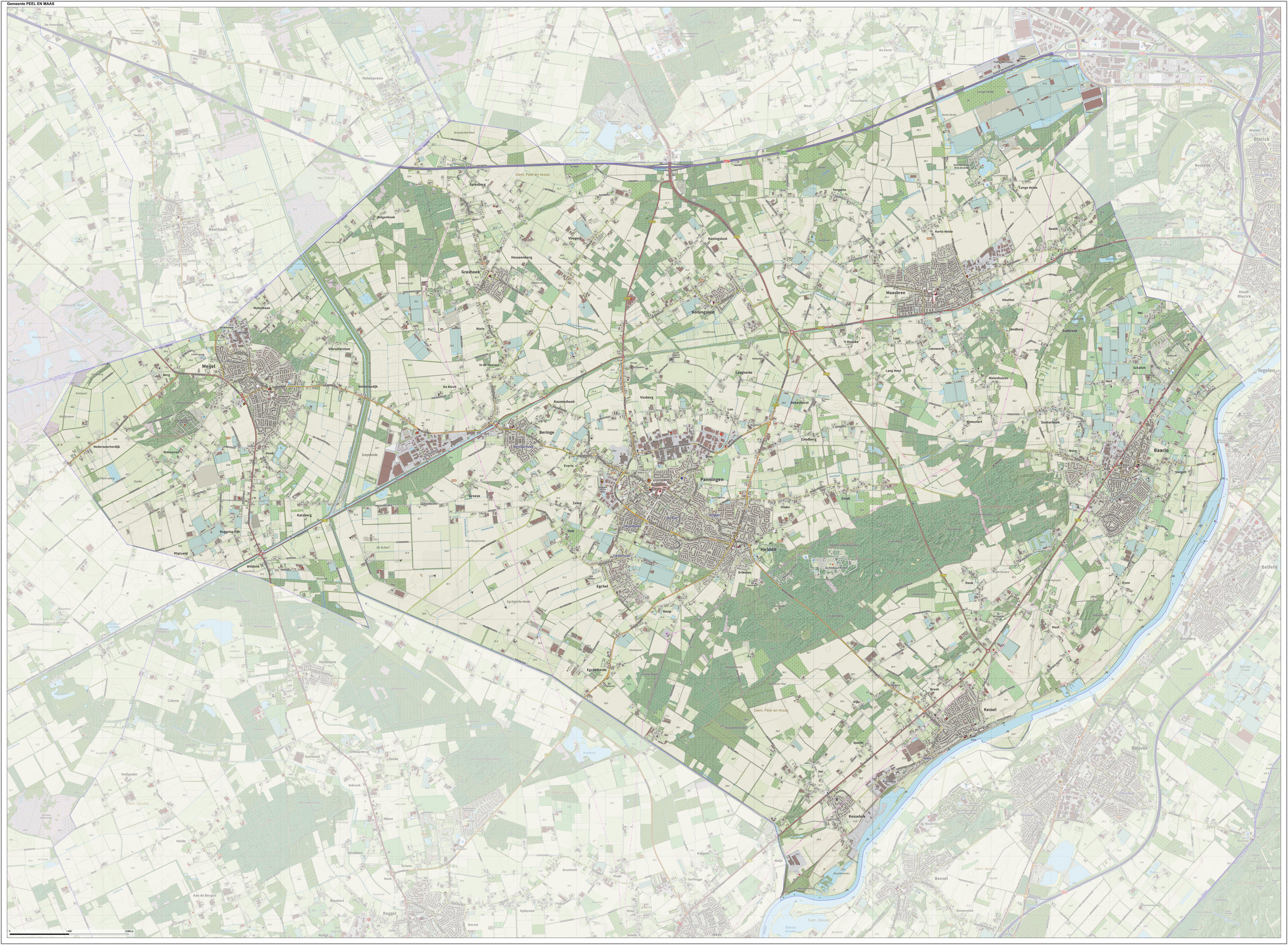 Topografische gemeentekaart. Resolutie: 400 pixels/km. Kaartbeeld samengesteld uit de open geodata van de Top10NL en Top25namen (Kadaster), Creative Commons-BY licentie. Gebouwvlakken uit open geodata BAG extract. Wegen uit de OpenStreetMap, OpenStreetMap community. Reliëfschaduw uit de Actuele Hoogtekaart AHN2. Samenstelling en kleurenschema: Jan-Willem van Aalst, met QGIS. Zie ook de Legenda.